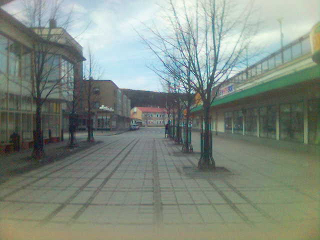 Bild från centrala Kramförs.